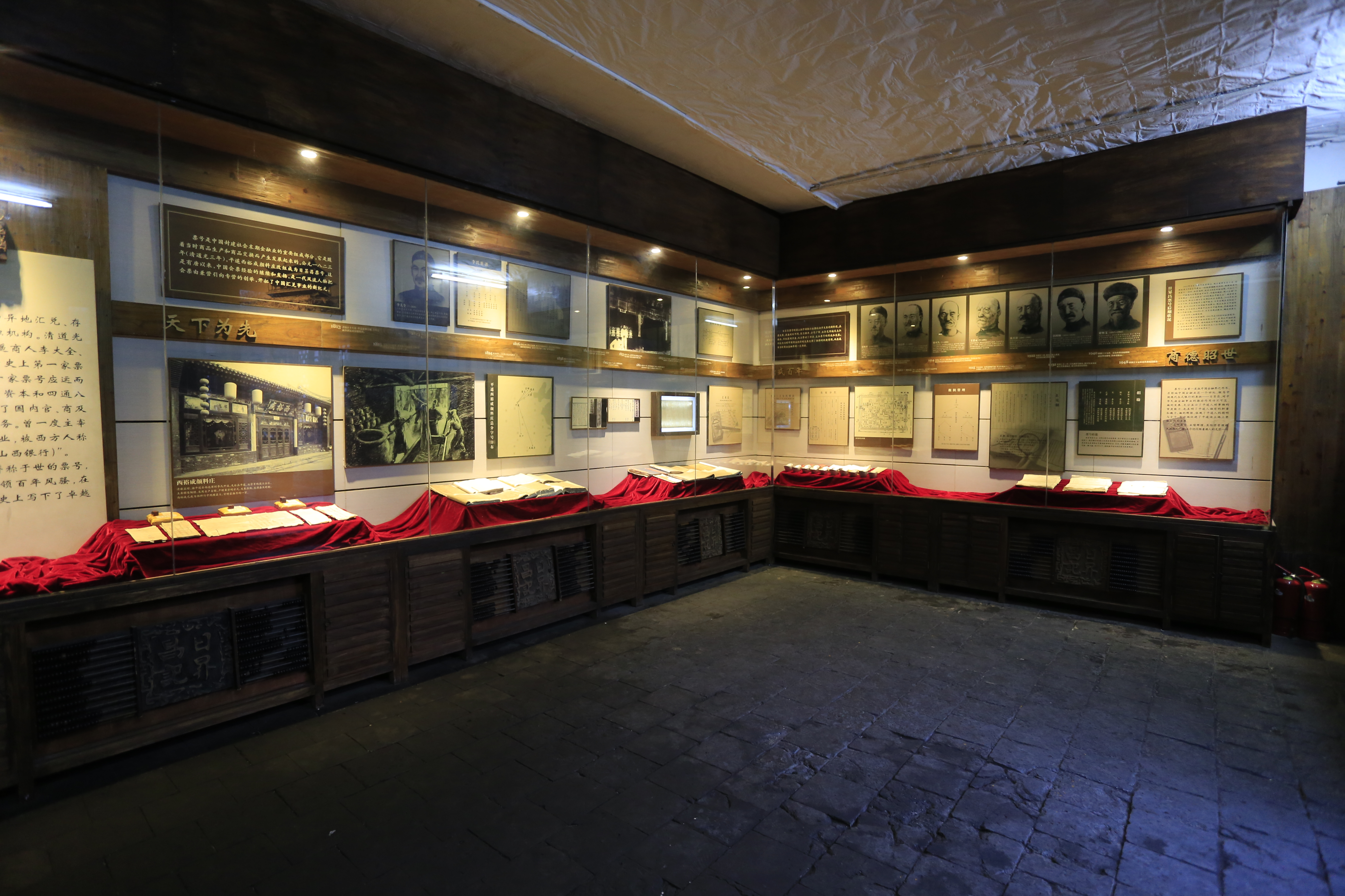 平遥日昇昌舊址 —— “匯通天下”內部